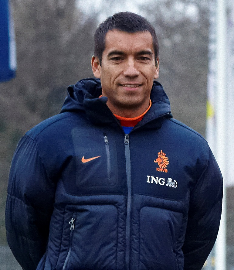 Giovanni van Bronckhorst am 28. Oktober 2011.